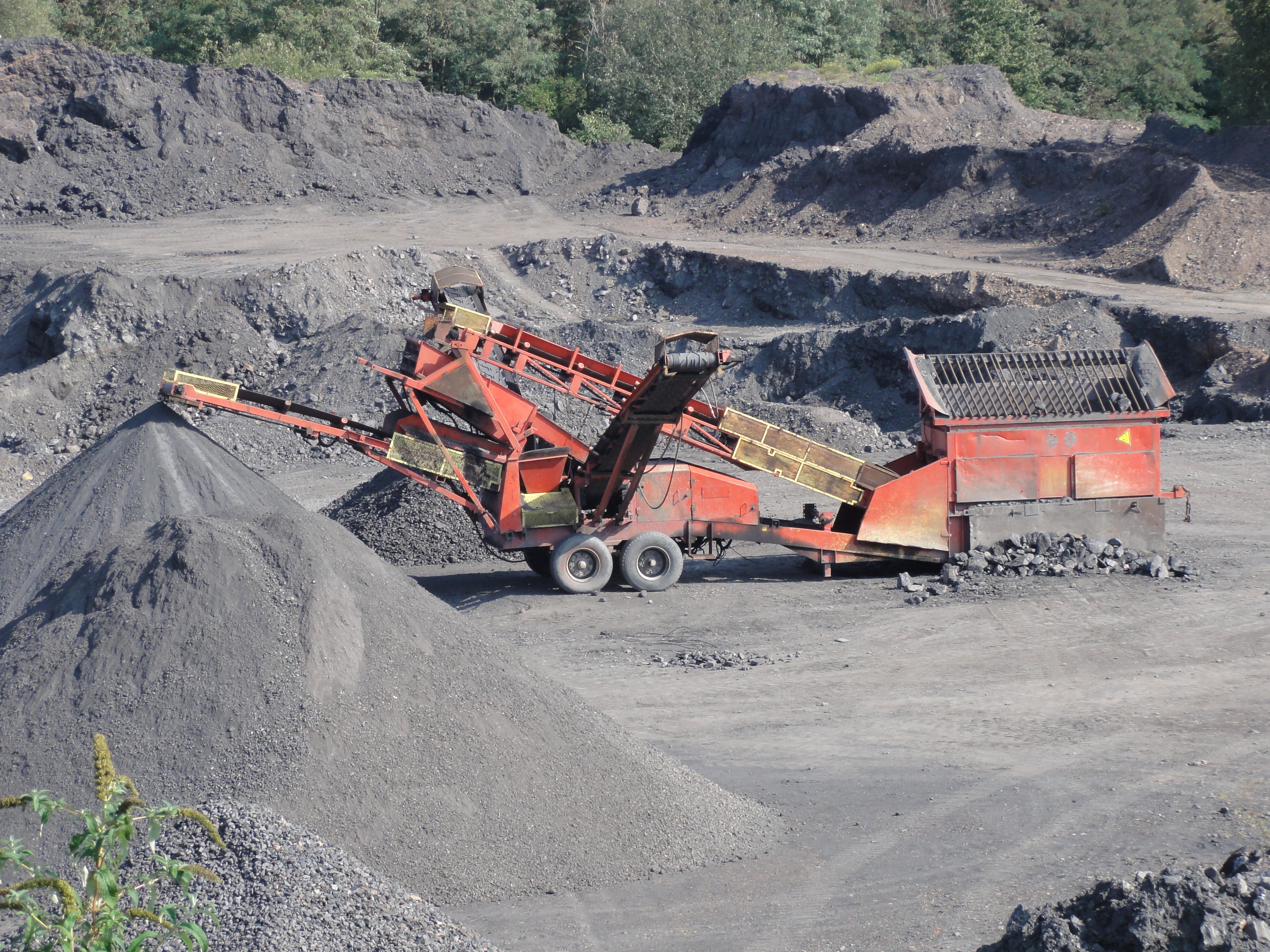 Terrils nos 201 et 202 respectivement dénommés Cuvinot et Cuvinot Ouest, Fosse Cuvinot de la Compagnie des mines d'Anzin, Onnaing, Nord, Nord-Pas-de-Calais, France.